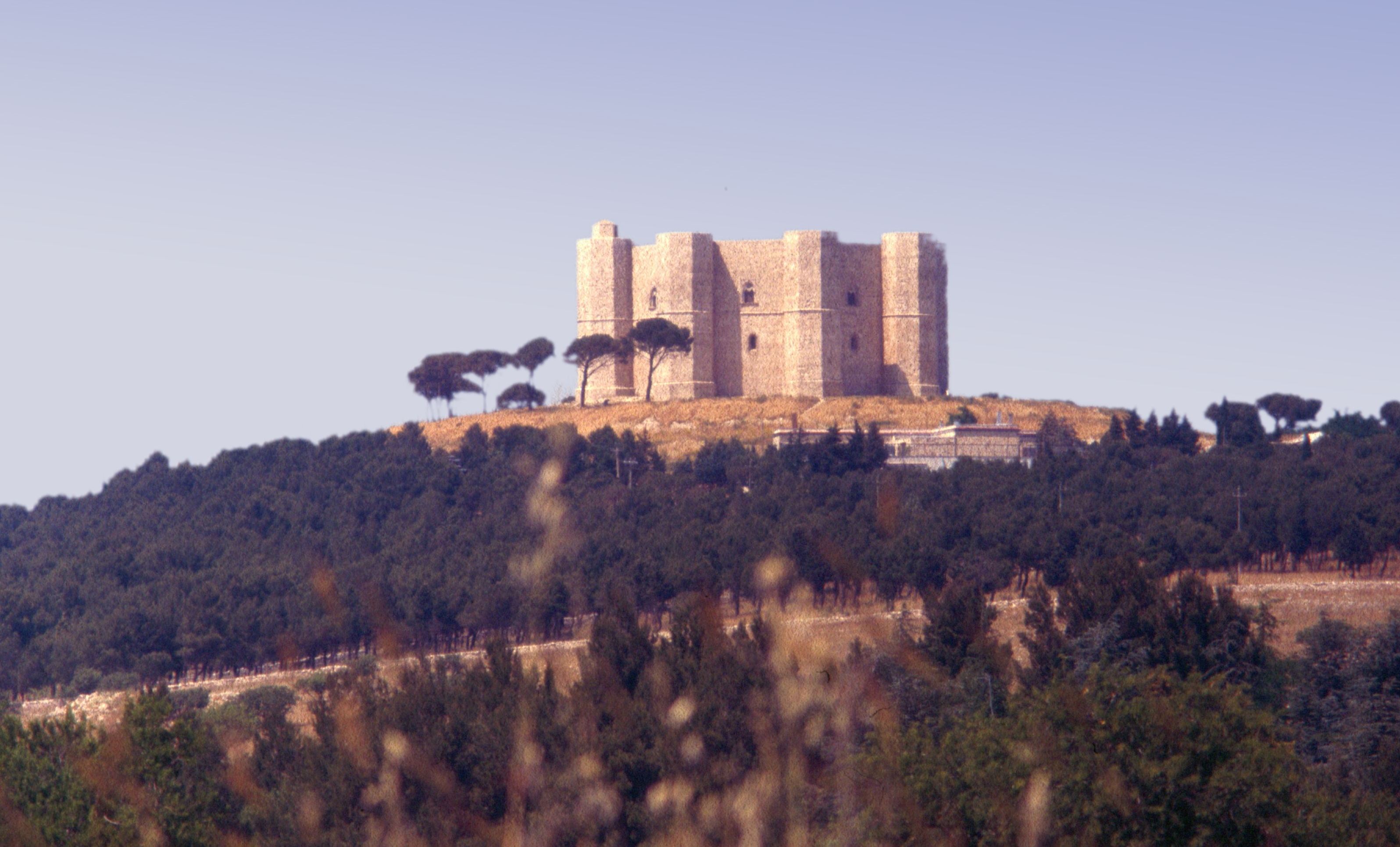 Castel del Monte in Apulien